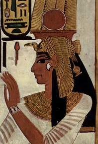 ネフェルティティ